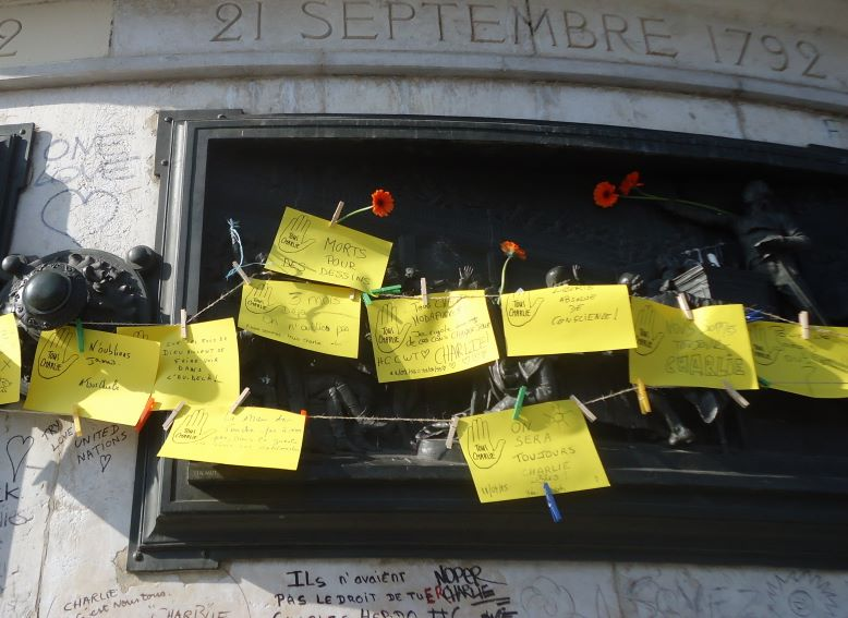 Tous Charlie, place de la République, Marianne